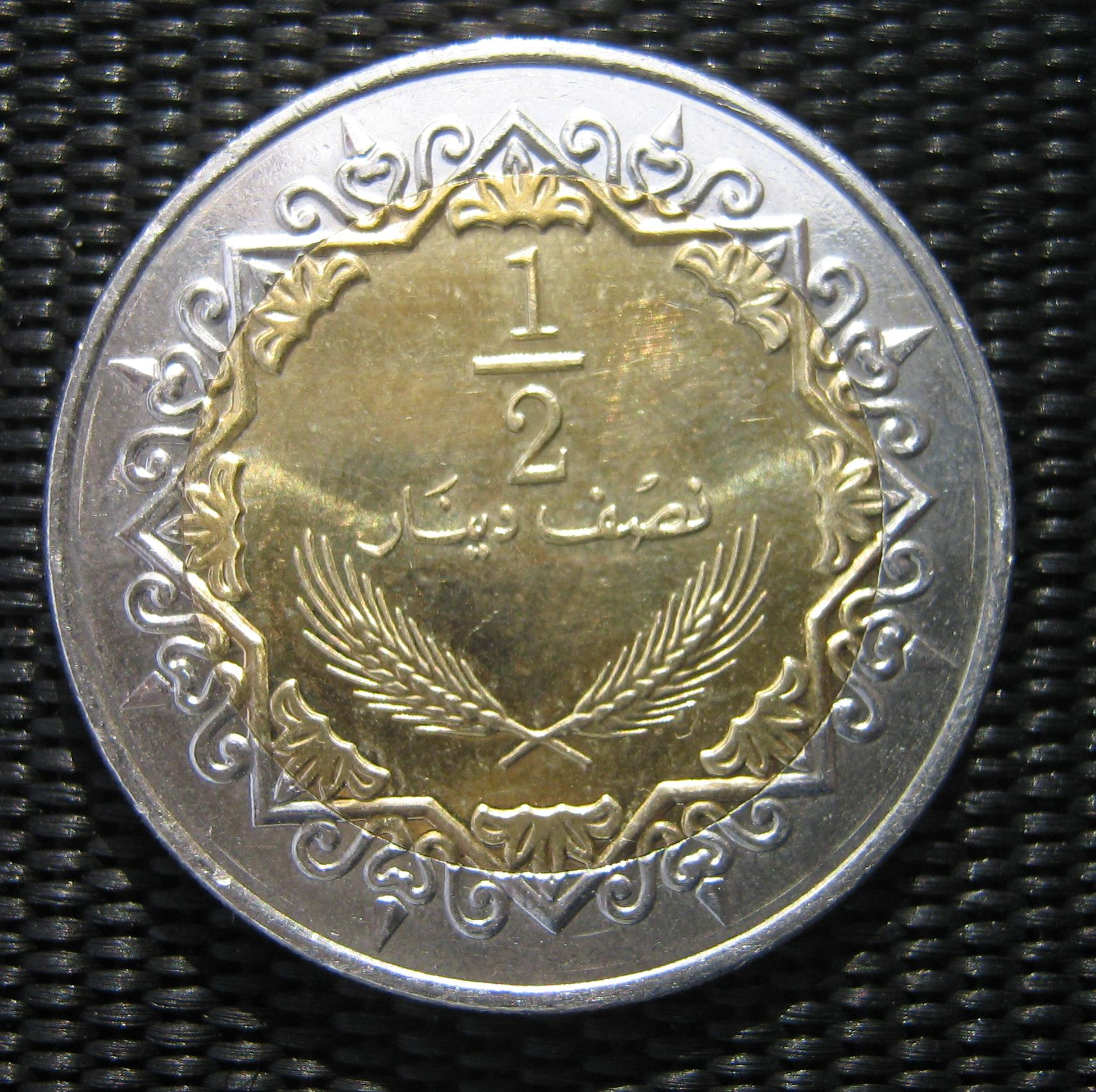 Ливийская монета наибольшего номинала - половина динара.